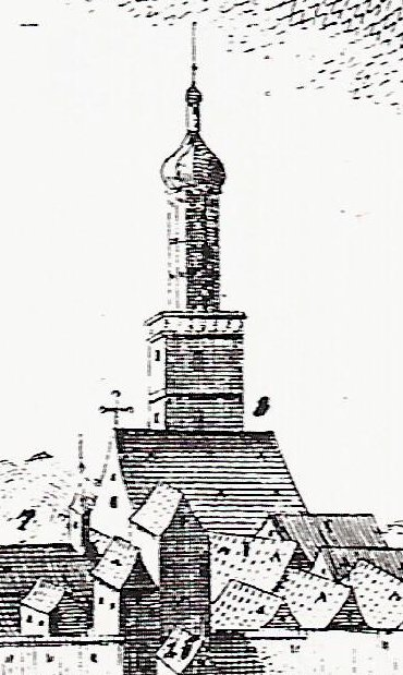 Stadtkirche Aalen